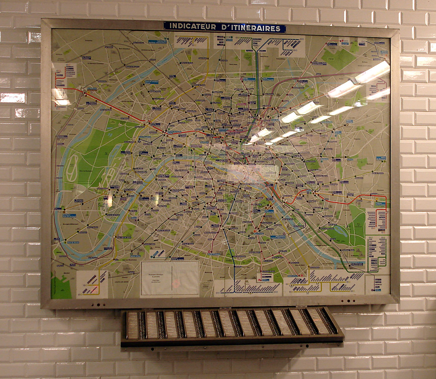 Indicateur d'itinéraires à la station Pont de Levallois - Bécon de la ligne 3 du métro de Paris, France